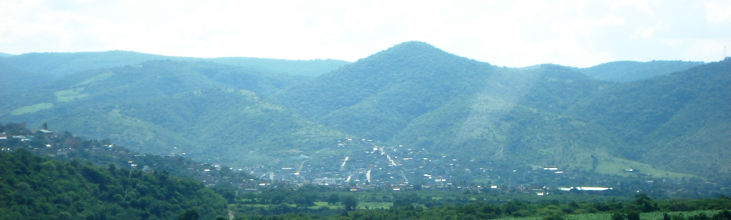 Panorama de la Ciudad de Zumpango del Río, Guerrero, Desde la Autopista del Sol.